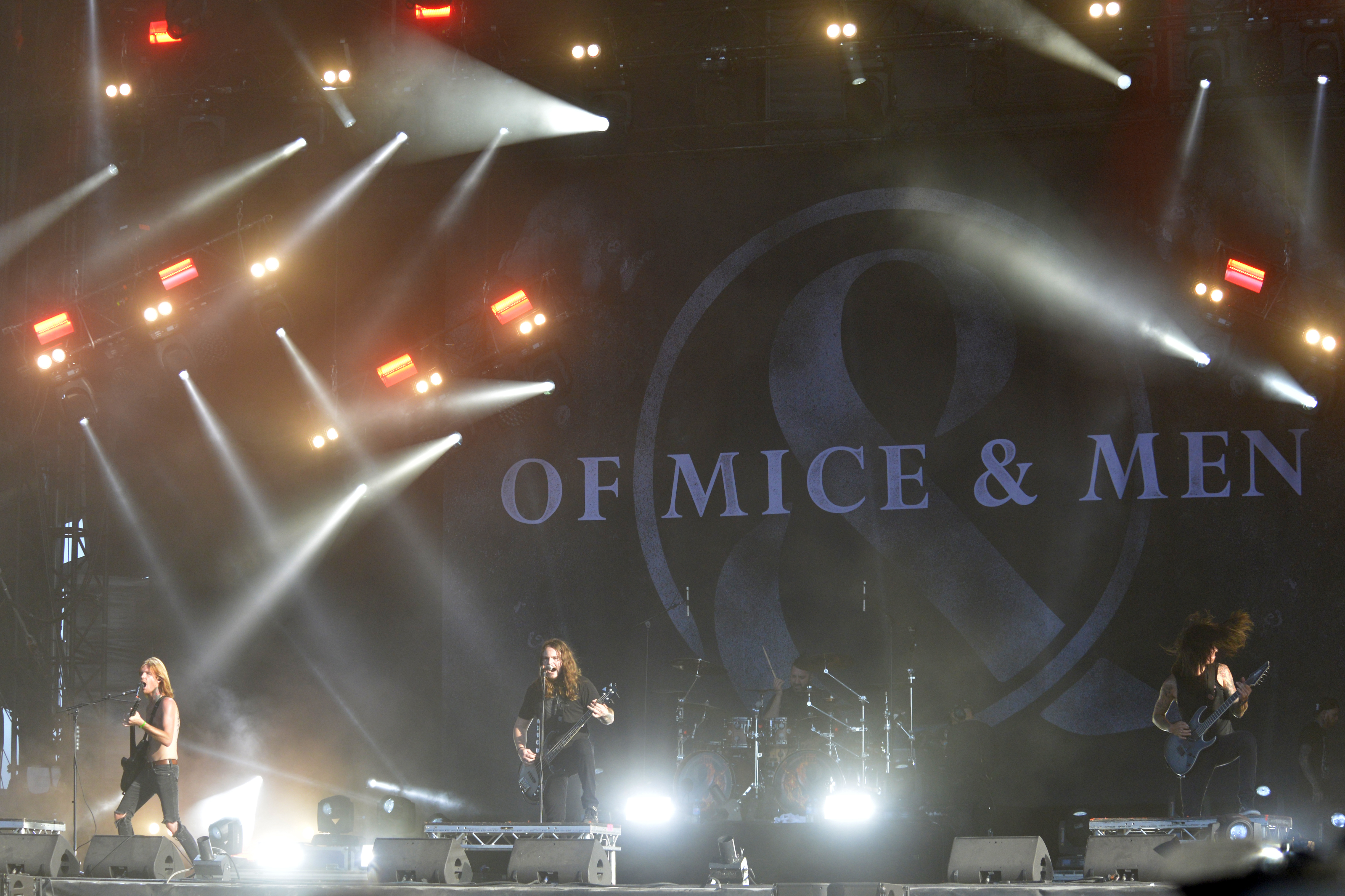 Of Mice & Men, Hellfest 2017.